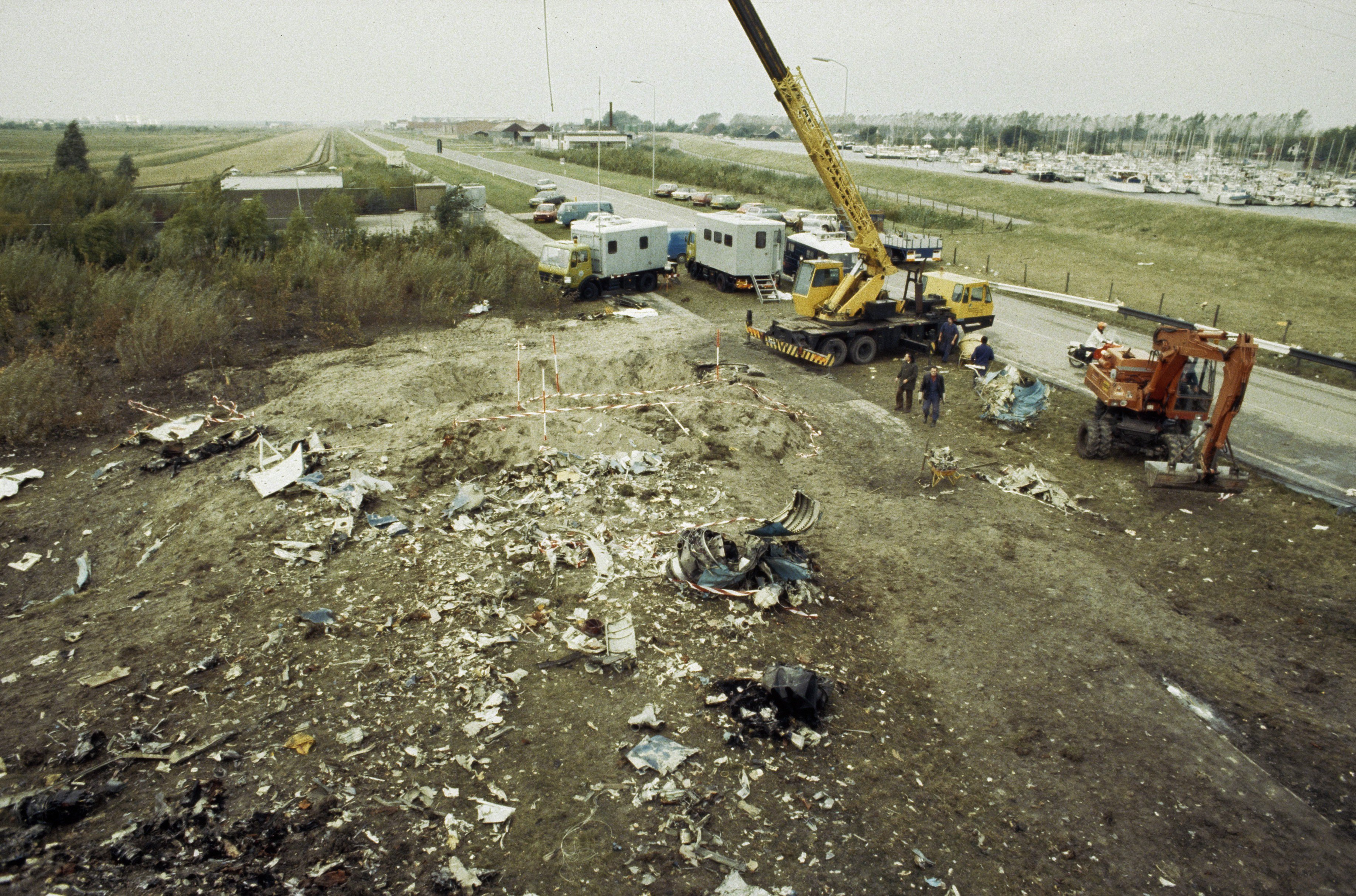 Collectie / Archief : Fotocollectie Anefo Reportage / Serie : [ onbekend ] Beschrijving : Berging van vliegtuigresten en stof. resten van slachtoffers na de vliegramp bij Moerdijk waarbij een Fokker Fellowship van de NLM is neergestort / Datum : 8 oktober 1981 Trefwoorden : BERGING, SLACHTOFFERS, Vliegrampen Persoonsnaam : Fokker Fellowship Fotograaf : Croes, Rob C. / Anefo Auteursrechthebbende : Nationaal Archief Materiaalsoort : Dia (kleur) Nummer archiefinventaris : bekijk toegang 2.24.01.06 Bestanddeelnummer : 253-8608